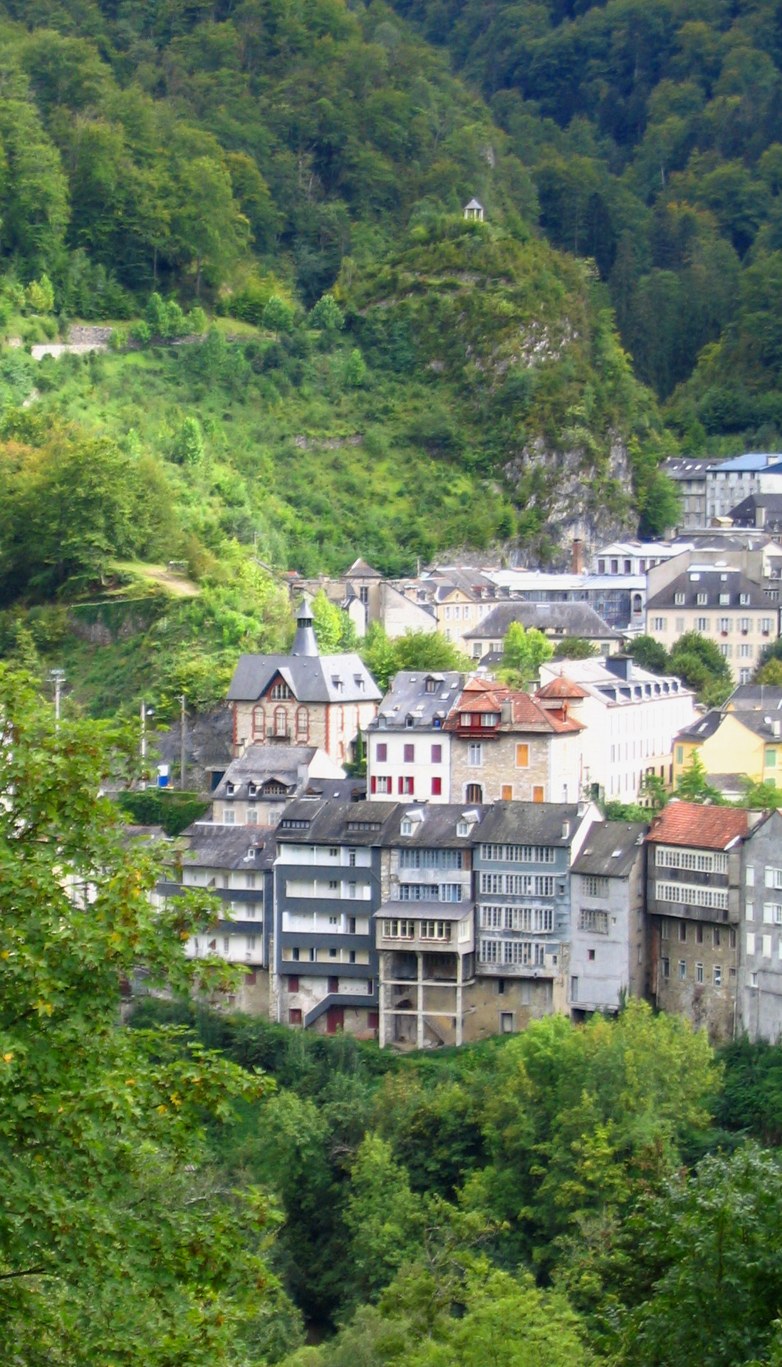 Vue générale des Eaux-Bonnes - Pyrénées Atlantiques Auteur: P.Charpiat - 2006